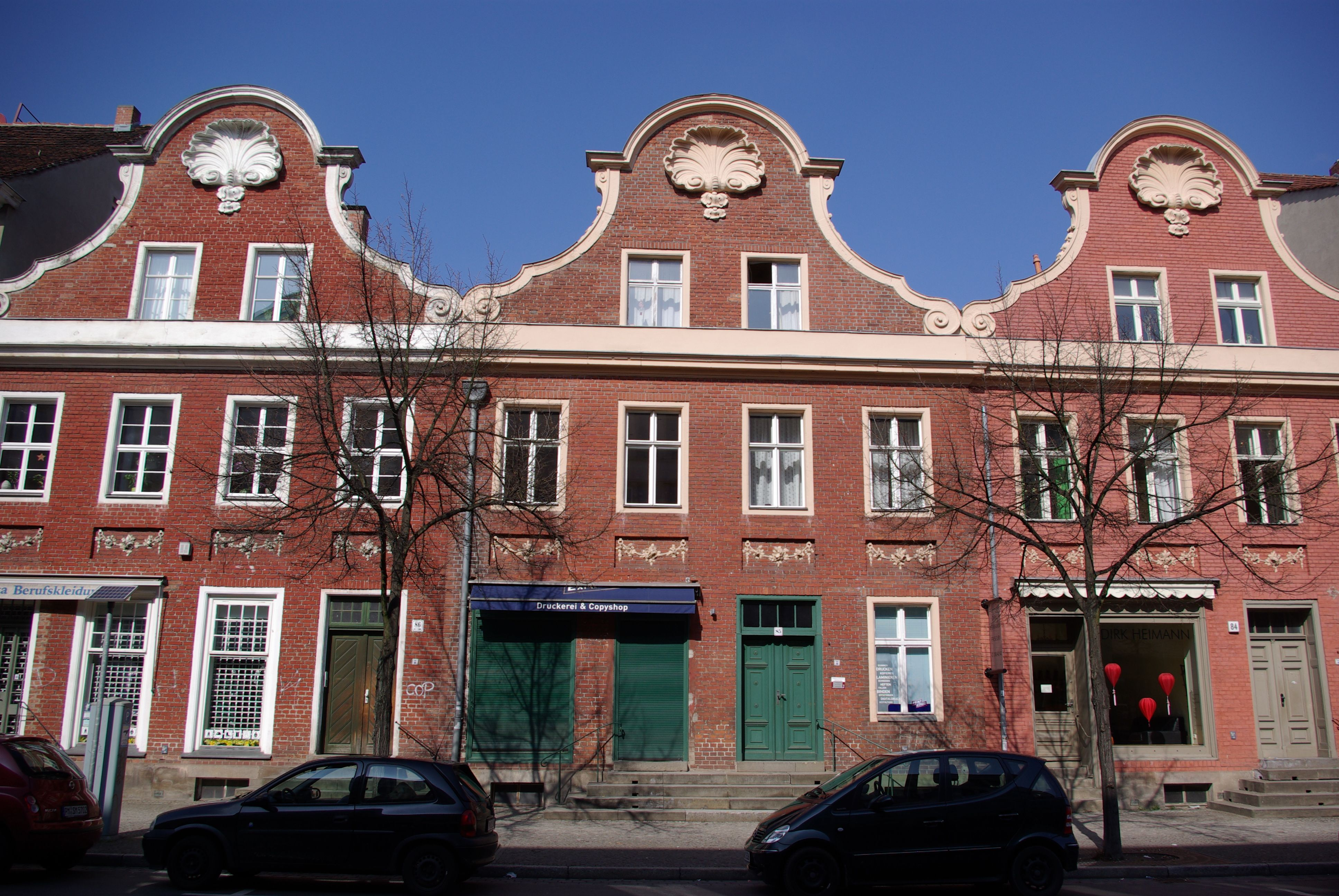 Potsdam in Brandenburg. Das Haus in der Charlottenstraße 85 steht unter Denkmalschutz.